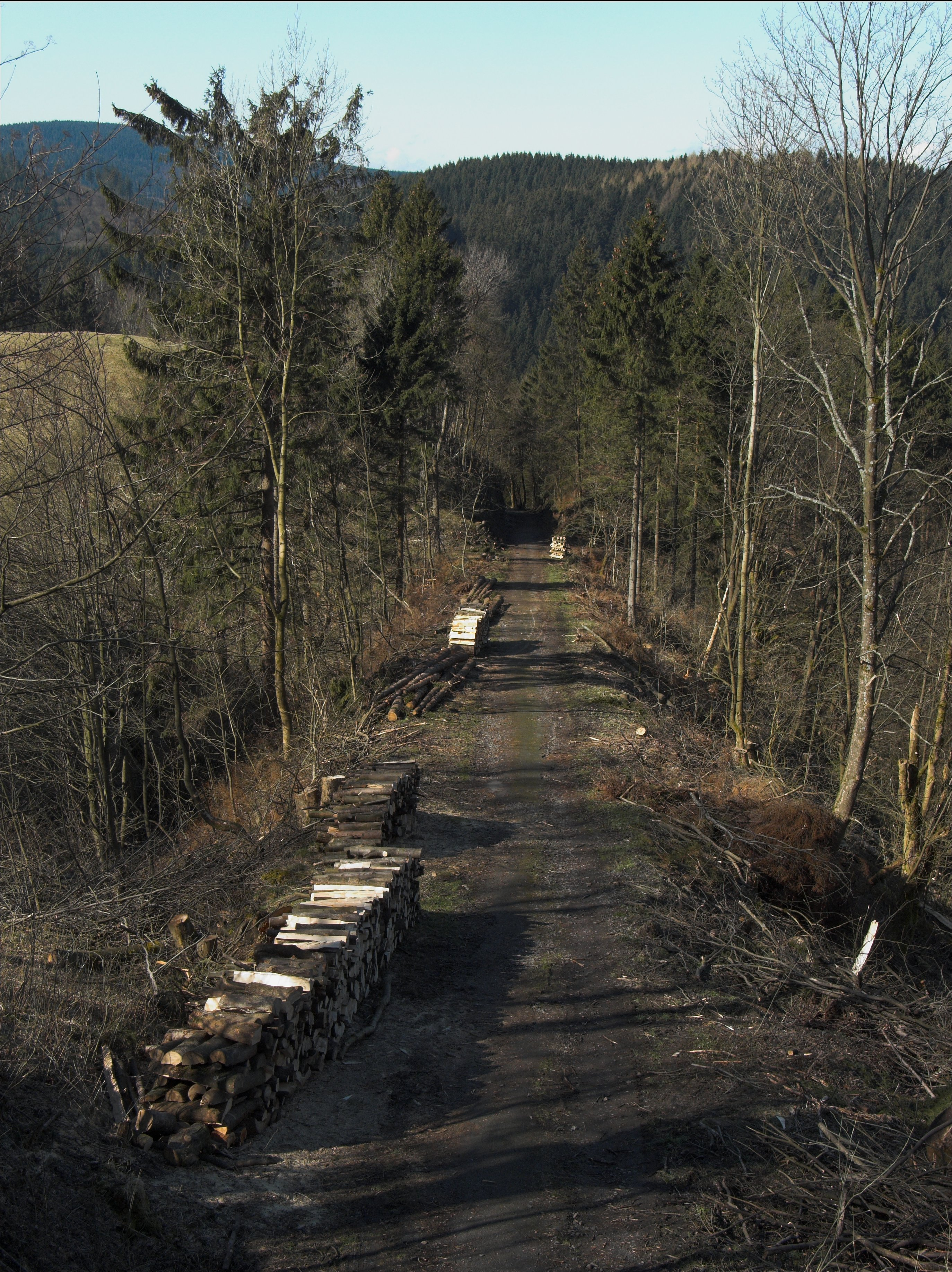 Ehemaliger Bahndamm der Zahnradstrecke